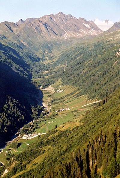 Val Bedretto (TI) in Richtung Nufenenpass, links unten das Dörfchen Villa, in der Mitte Bedretto und zu Hinterst Ronco.